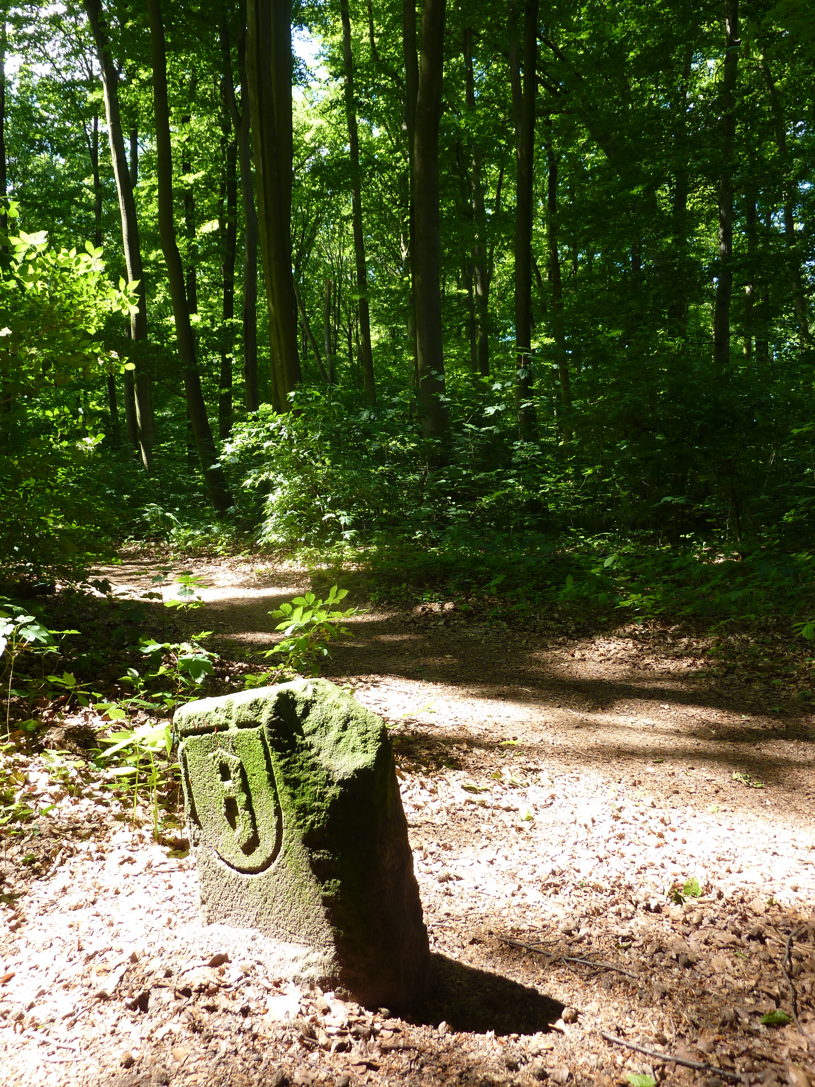 Der Schäfersteinpfad ist ein historischer Grenzweg aus dem 15. Jahrhundert in der Stadt Frankfurt am Main. Der Pfad markierte seit dem Jahr 1448 die Grenze zweier als Viehweide genutzer bewaldeter Gebiete (Hutewald) im Frankfurter Stadtwald – die der Stadt Frankfurt und die der in Sachsenhausen ansässigen Kommende des Deutschen Ordens. Das Foto zeigt einen der Grenzsteine mit spiegelverkehrtem Buchstaben F als Symbol für Frankfurt